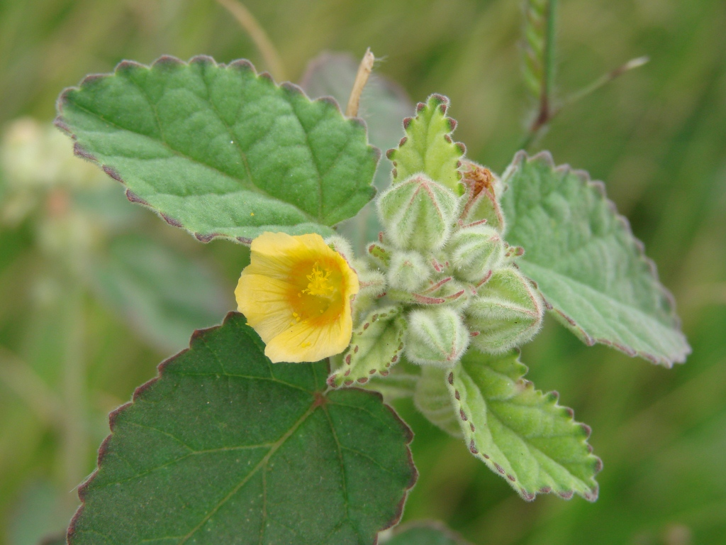 Sida cordifolia L. - MALVACEAE - Parque Vivencial Asa Norte - Brasília - Distrito Federal - Brasil.